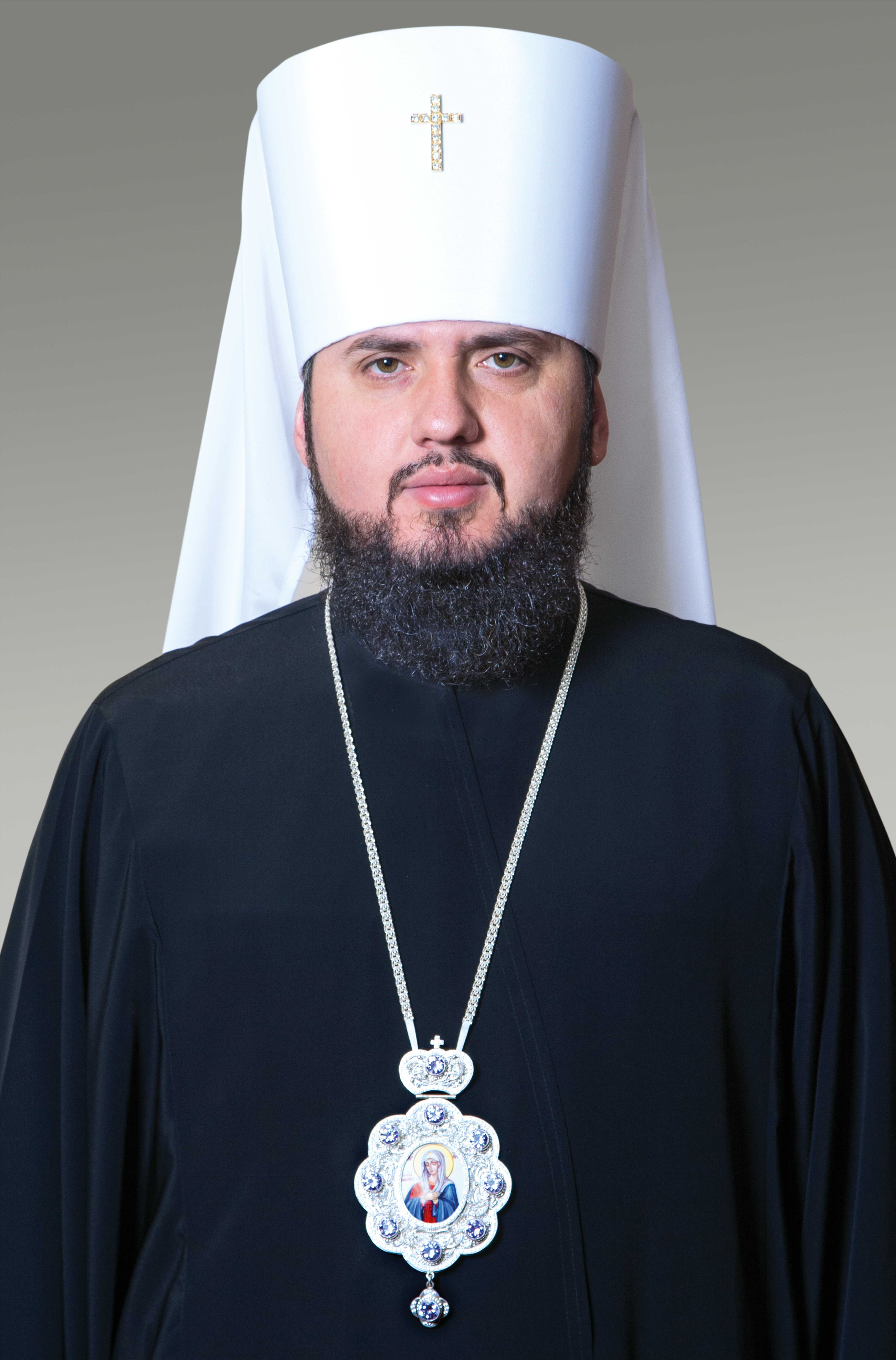 митрополит Епифаний (Думенко) – официальное фото